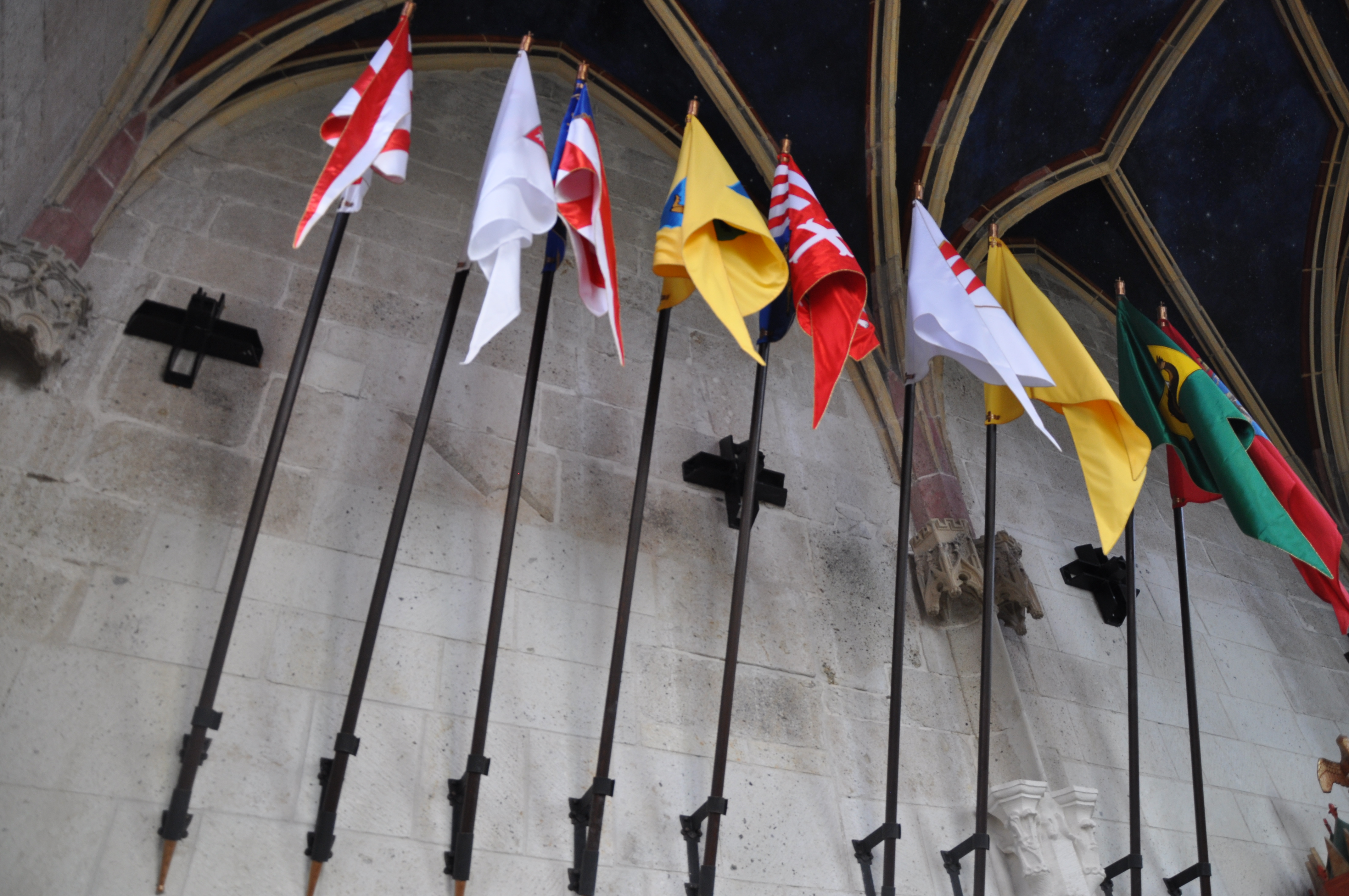 Az újjáépült Füzér vára, birtokosok zászlói